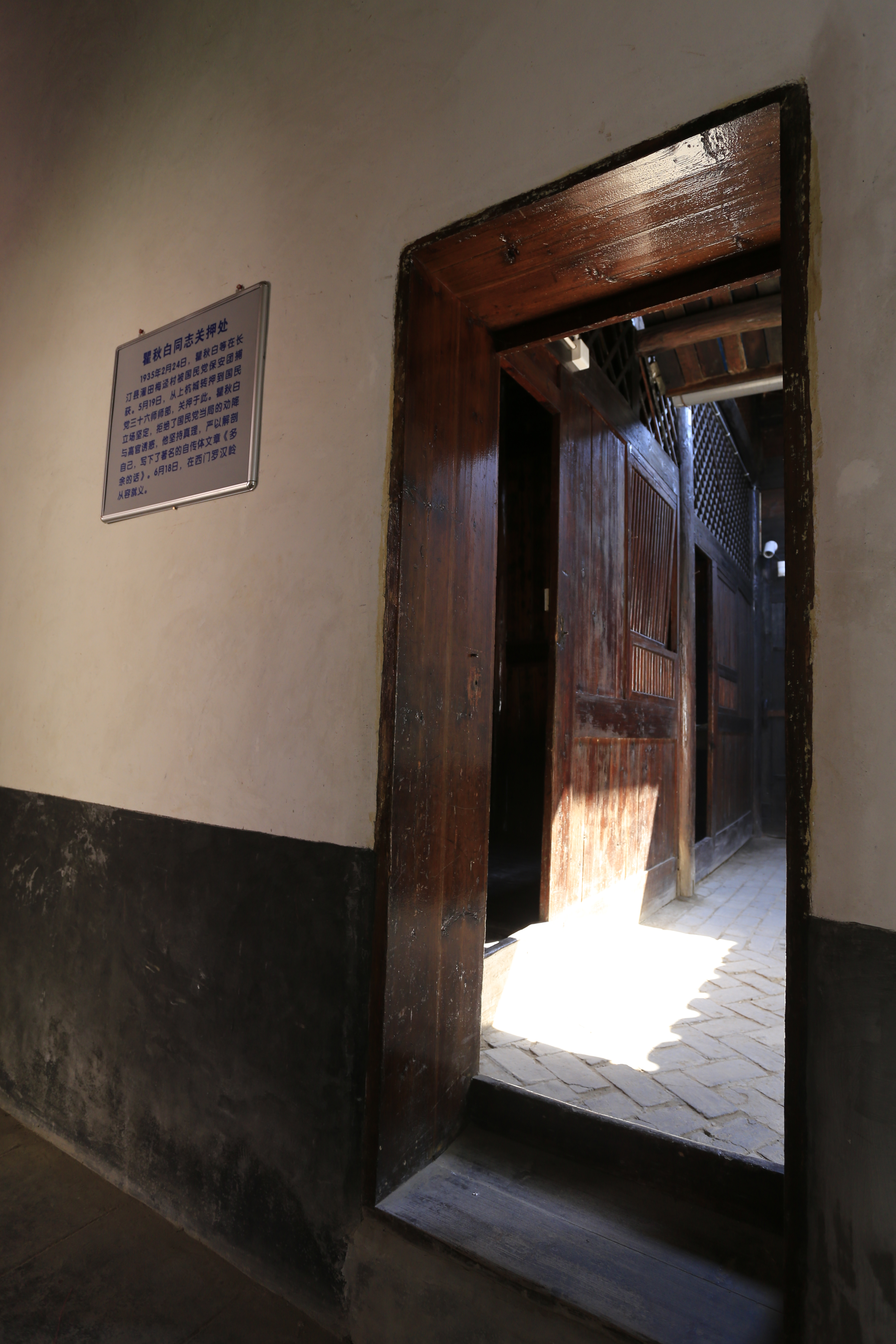 福建省长汀县"福建省苏维埃政府旧址"（即福建省工农民主政府旧址，原汀州府试院）—— 大殿东侧厢房（瞿秋白被俘后囚室）